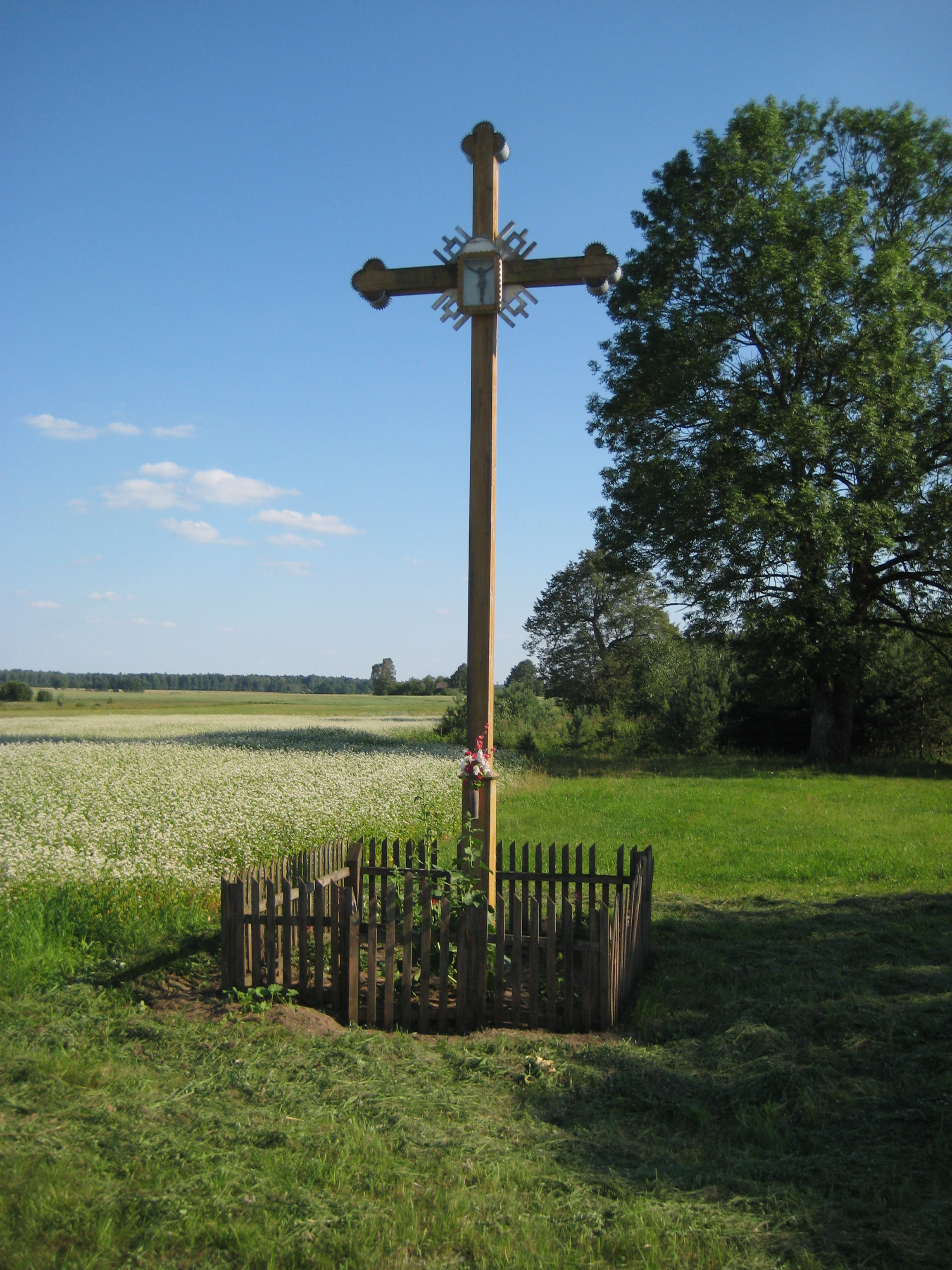 Krukliai 65241, Lithuania